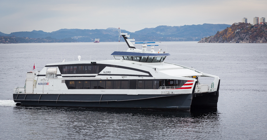 MS Njord i rute mellom Bergen og Askøy i 2015.